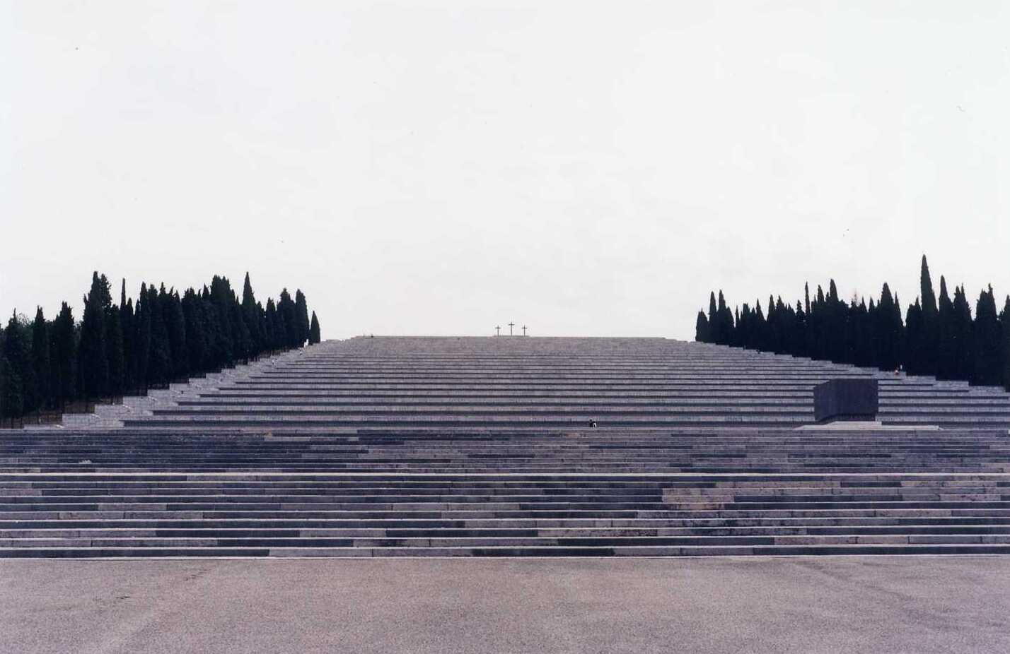 Foto del sacrario militare di Redipuglia